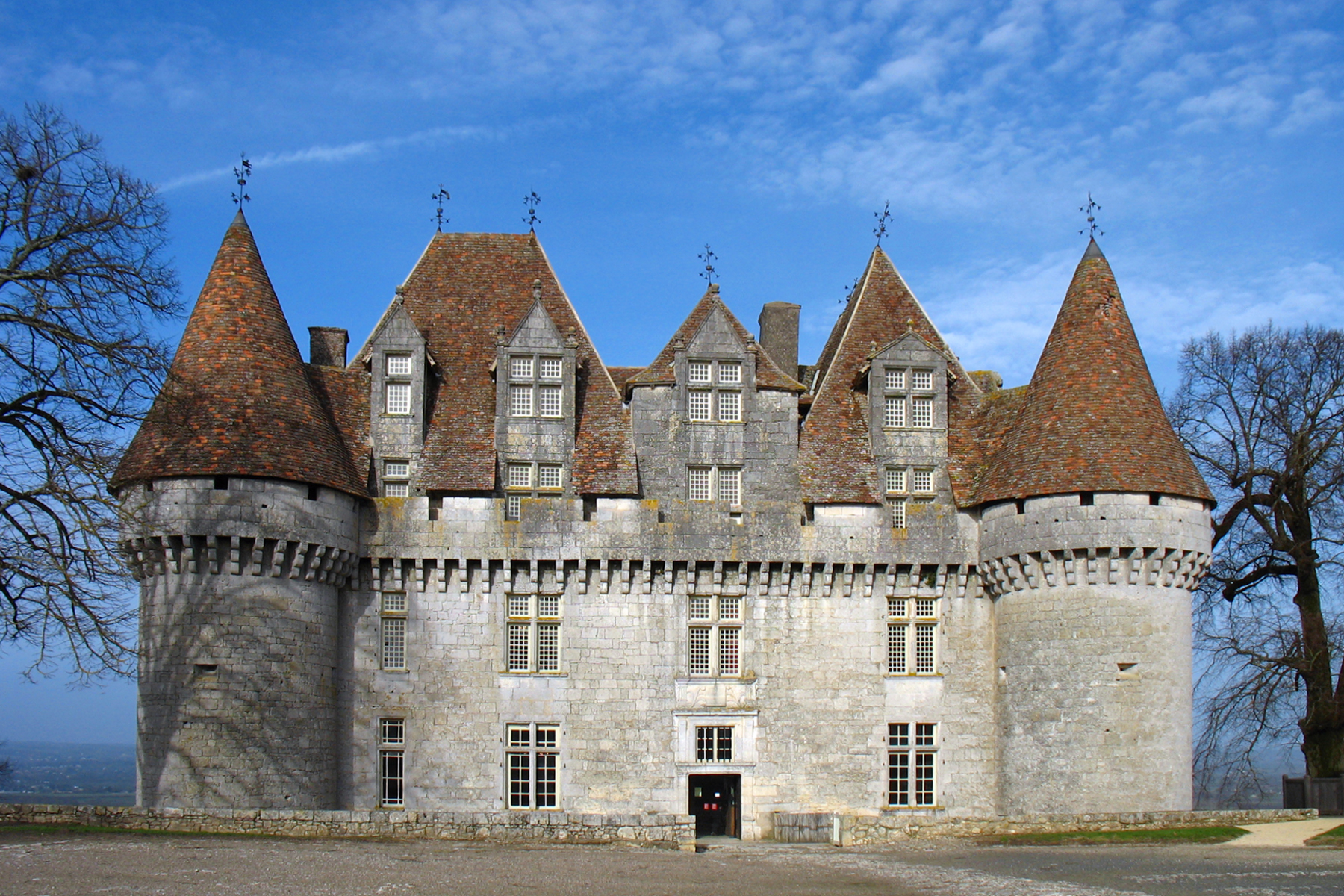 Le château de Monbazillac (Dordogne) France Object location44° 47′ 48″ N, 0° 29′ 39″ E